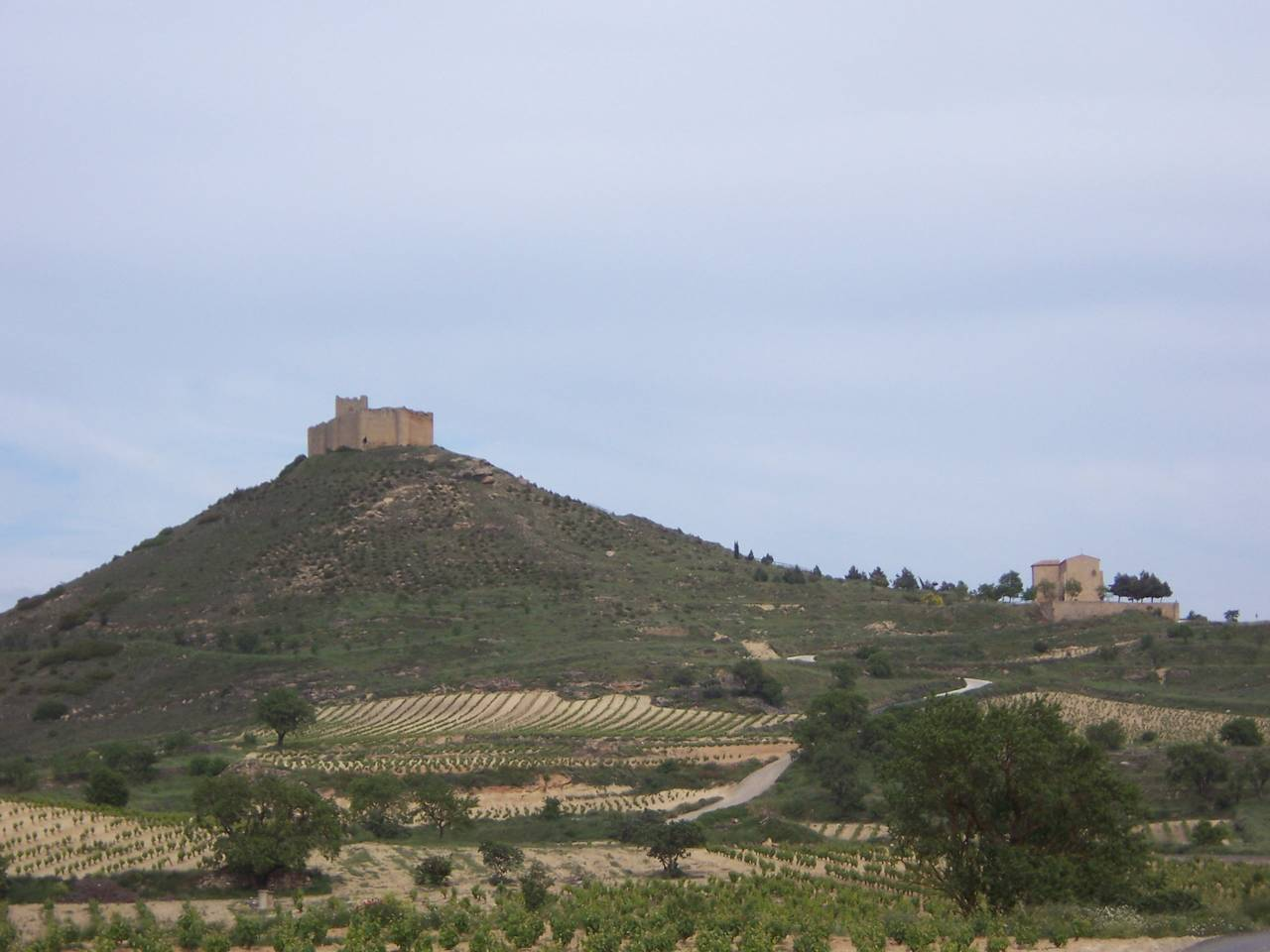 Vista del Castillo de Davalillo sobre un Cerro y ermita de Nuestra Señora de Davalillo